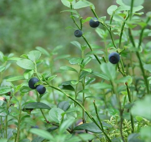 Mustikad